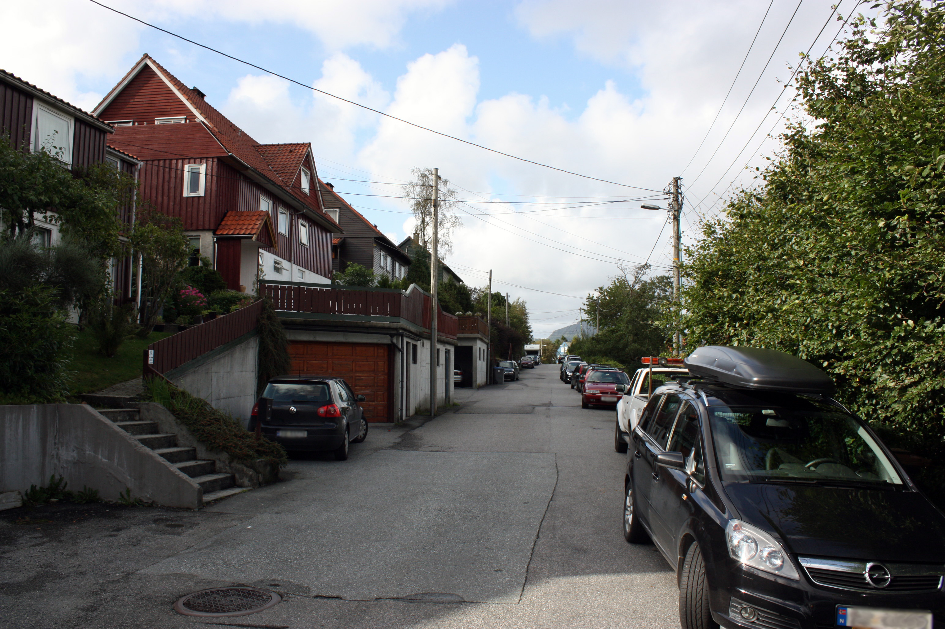 Odins veg, Fana, Bergen.